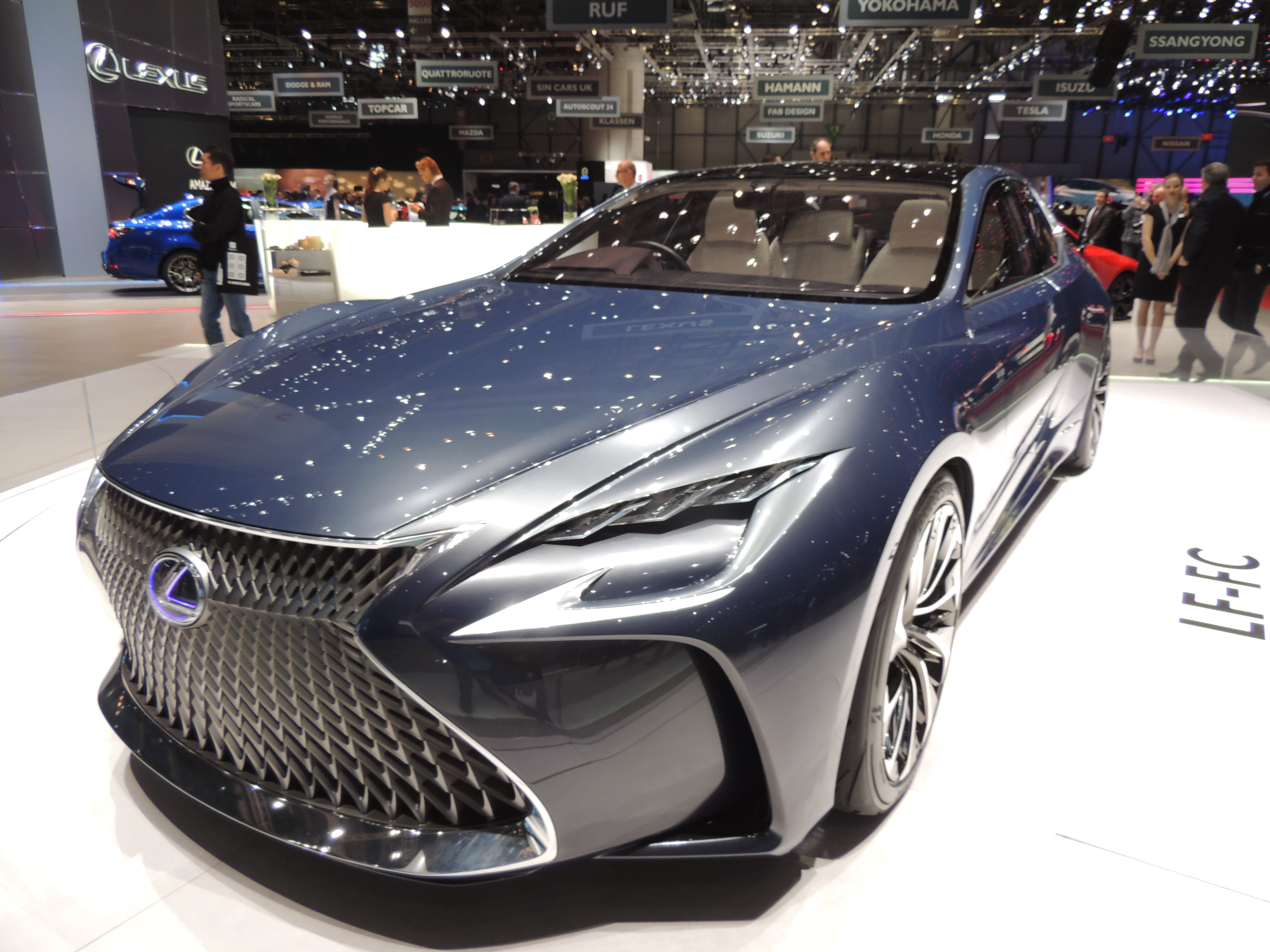 Lexus LF-FC, salon de Genève 2016